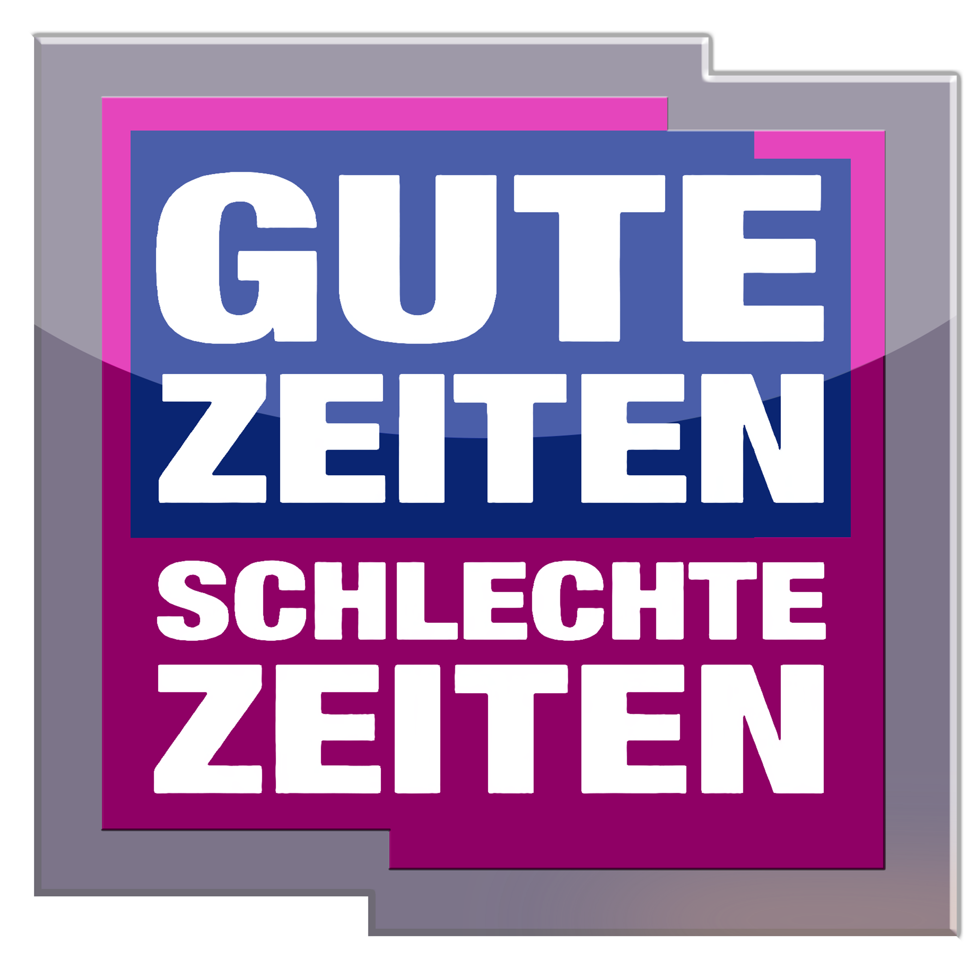 GZSZ Logo 2014-2017